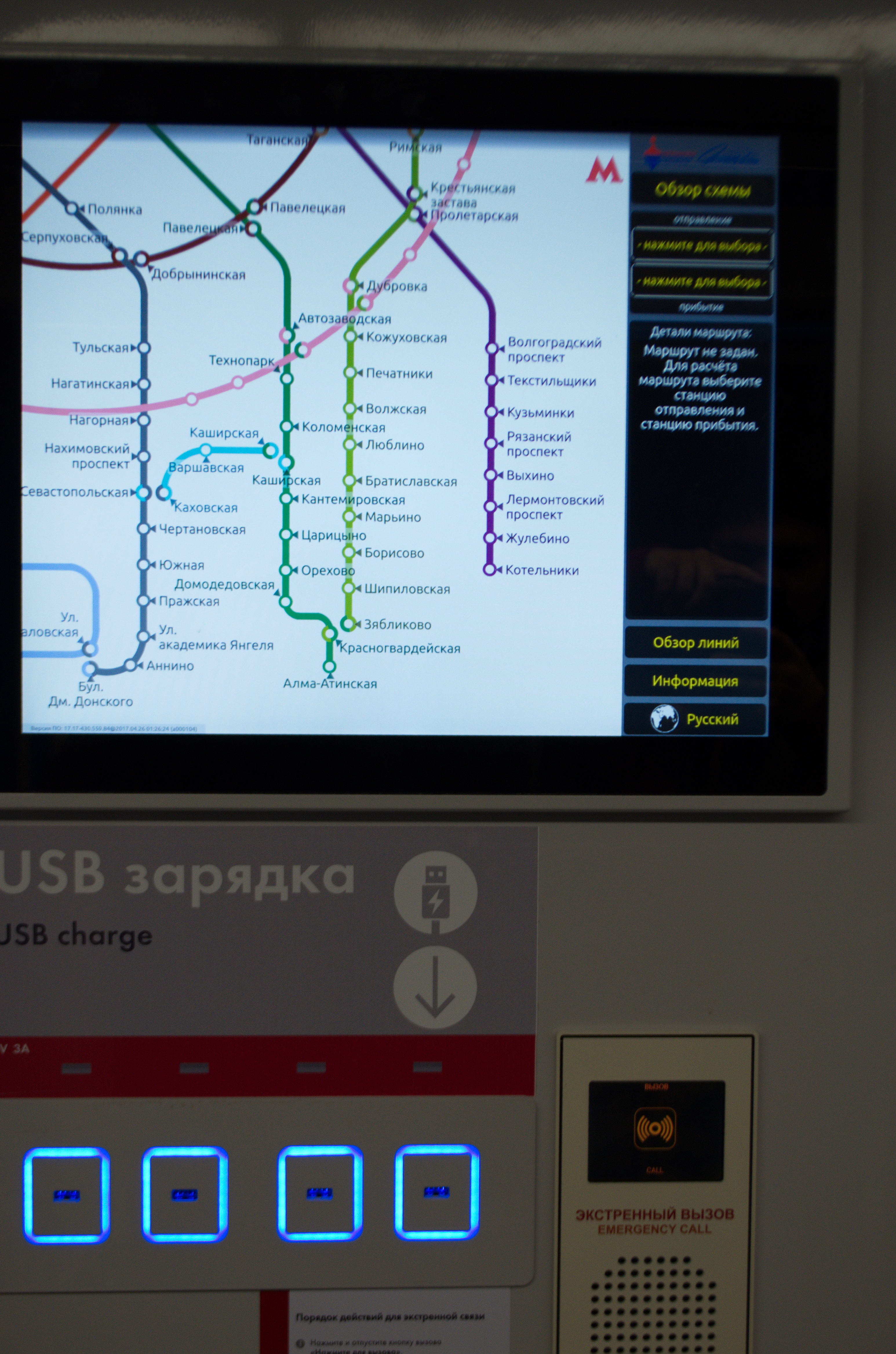 Сенсорный дисплей в передней части головного вагона поезда типа 81-765/766/767 «Москва». На схеме дисплея отображены станции метро на юго-востоке Москвы. Чуть ниже дисплея - USB-зарядки.